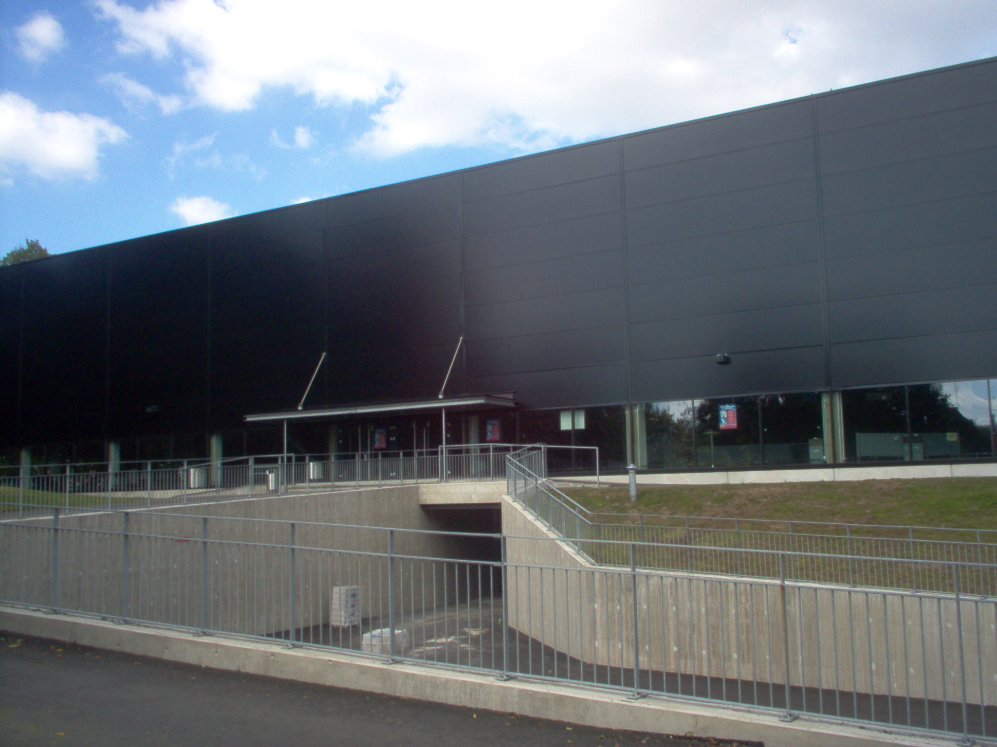 Kupittaan jäähalli, architect Pekka Mäki, Sigge Architects 2006